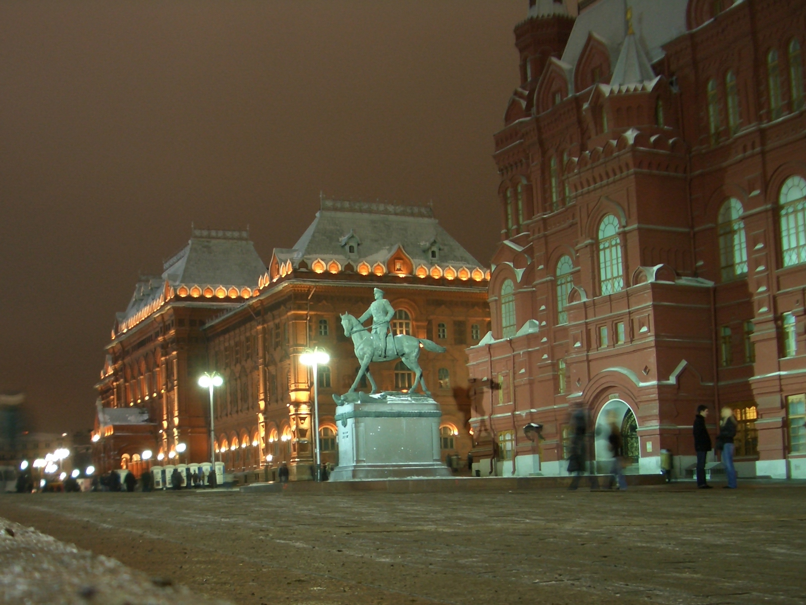 Zsukov marsall lovas szobra Moszkvában (Ohotnij rjad)